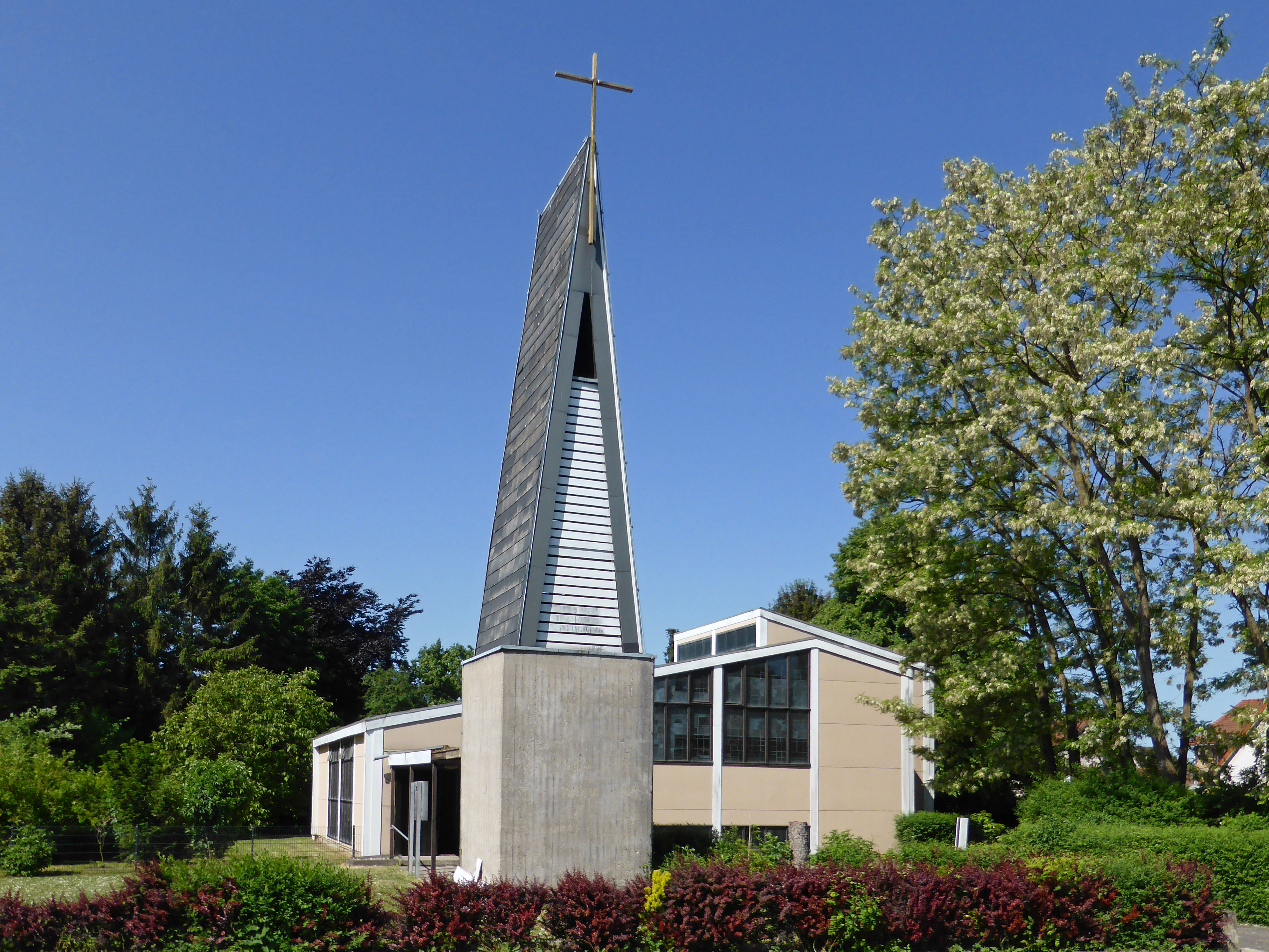 Katholische Kirche St. Theresia in Ahlten.